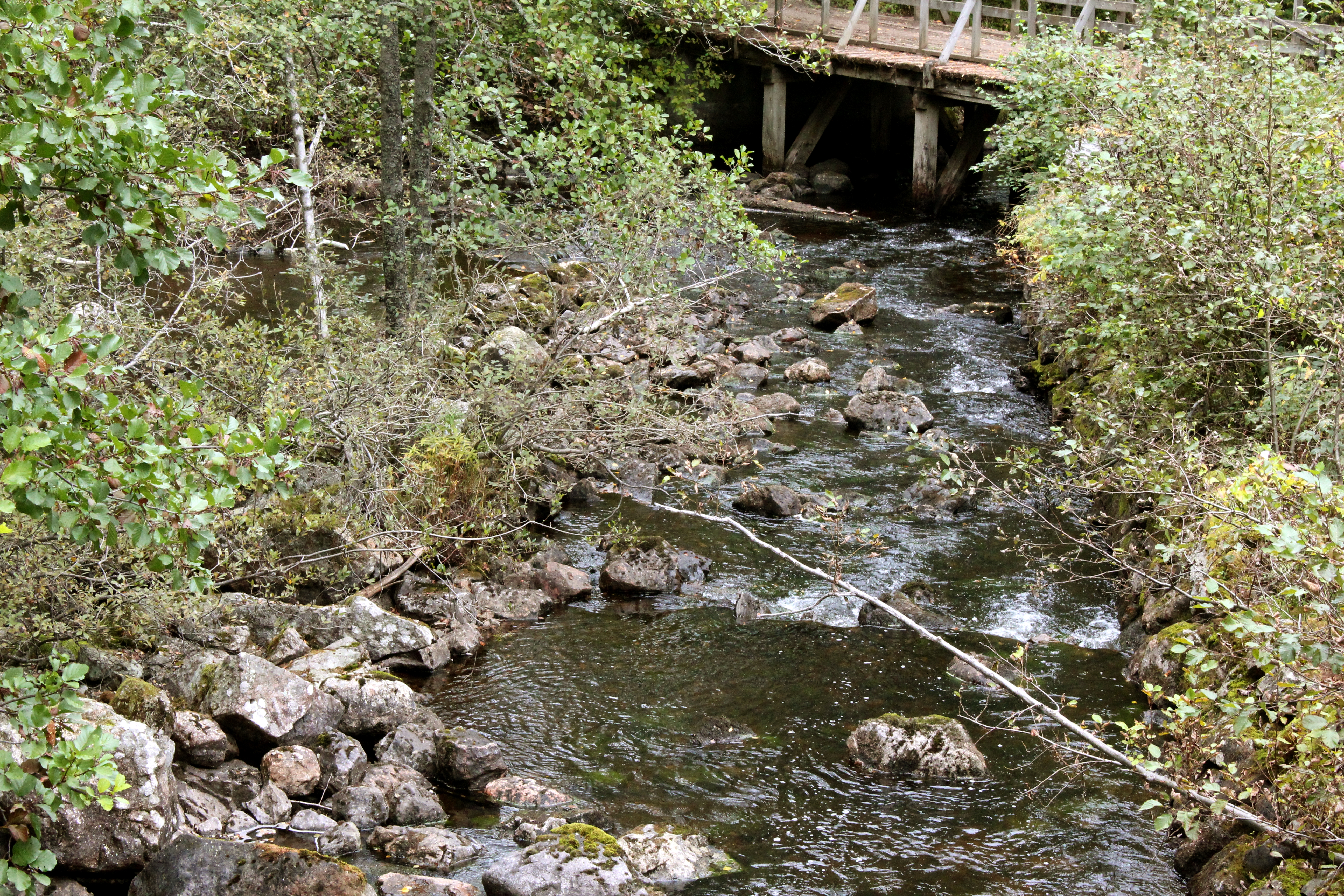 Miljön kring f.d. Montrose bruk, Hofors kommun, Sverige